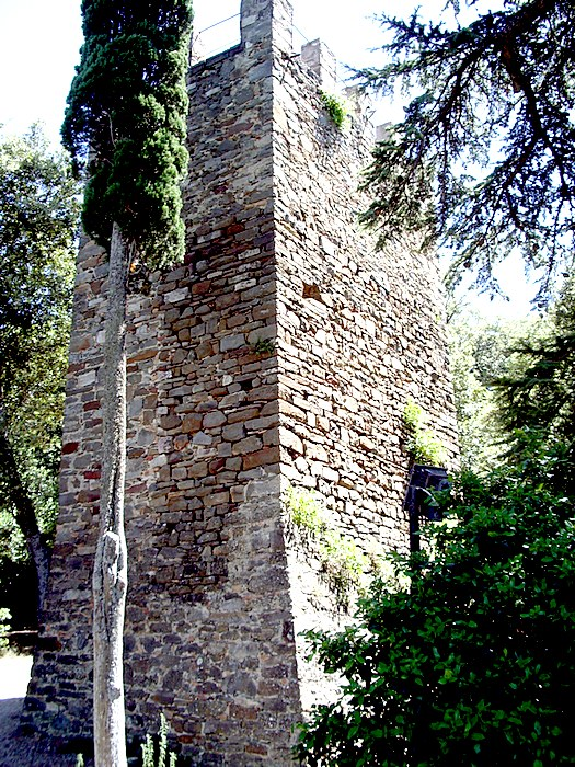 Torre del Cassero Senese a Montenero d'Orcia (GR), Tuscany (Italy)